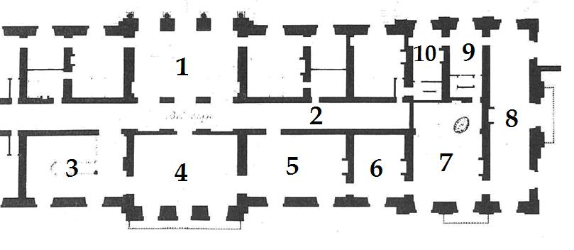 Distribution du Château-Neuf en 1709.